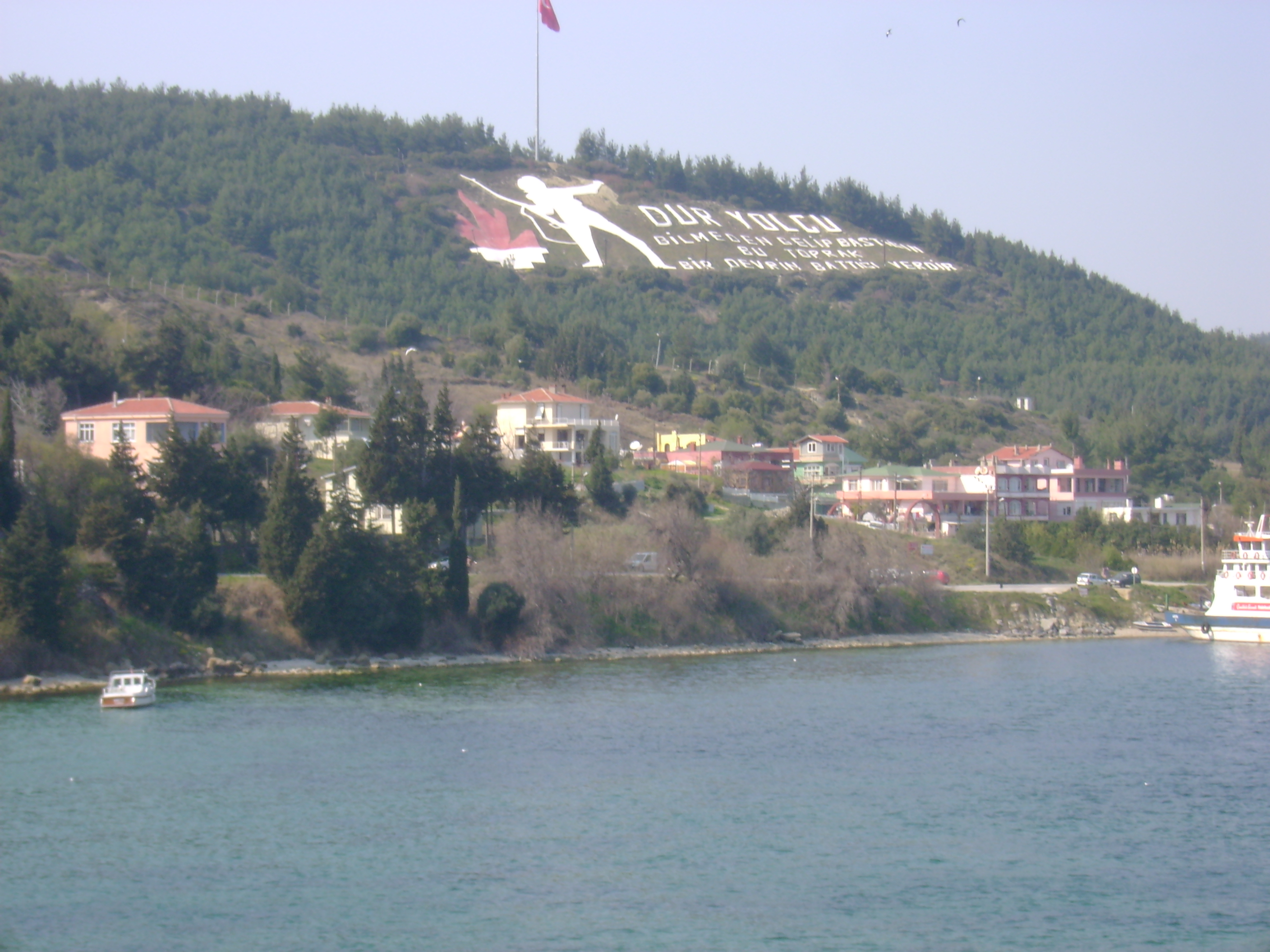 kendi eserrim